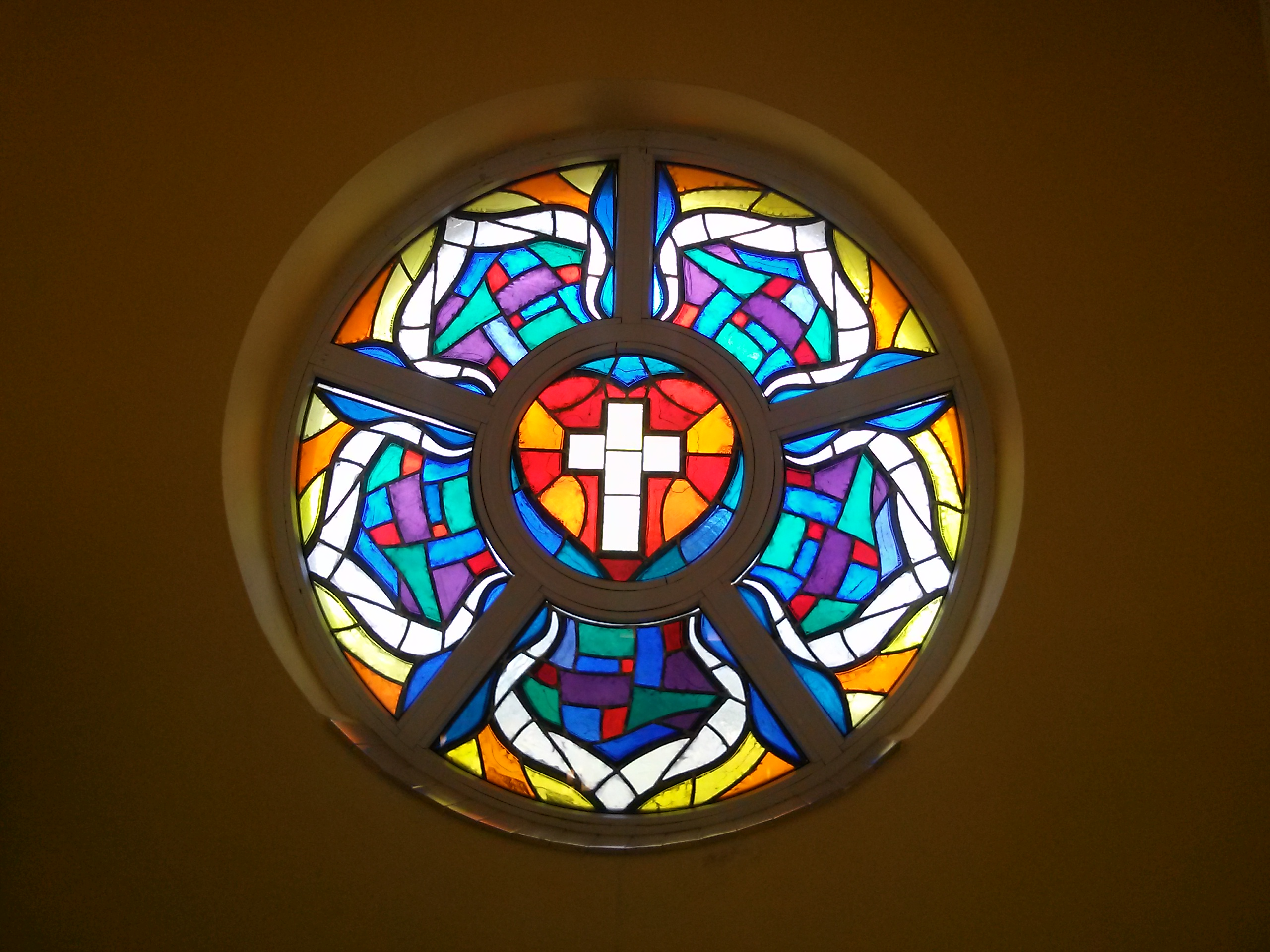 Vitráž zobrazující Lutherovi růži na věži evangelického kostela v Těrlicku